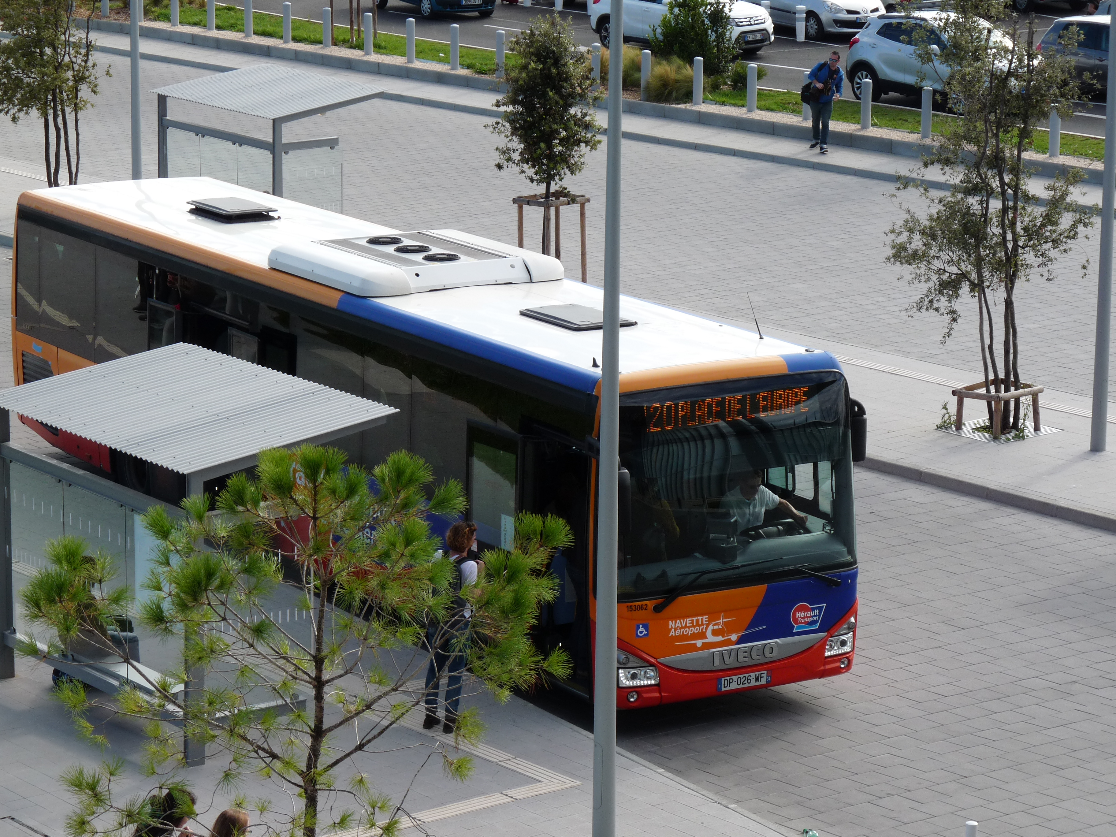 Het nieuwe station Montpellier-Sud-de-France